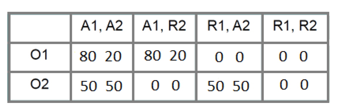 Matriz de Pagos Minujuego del Ultimátum